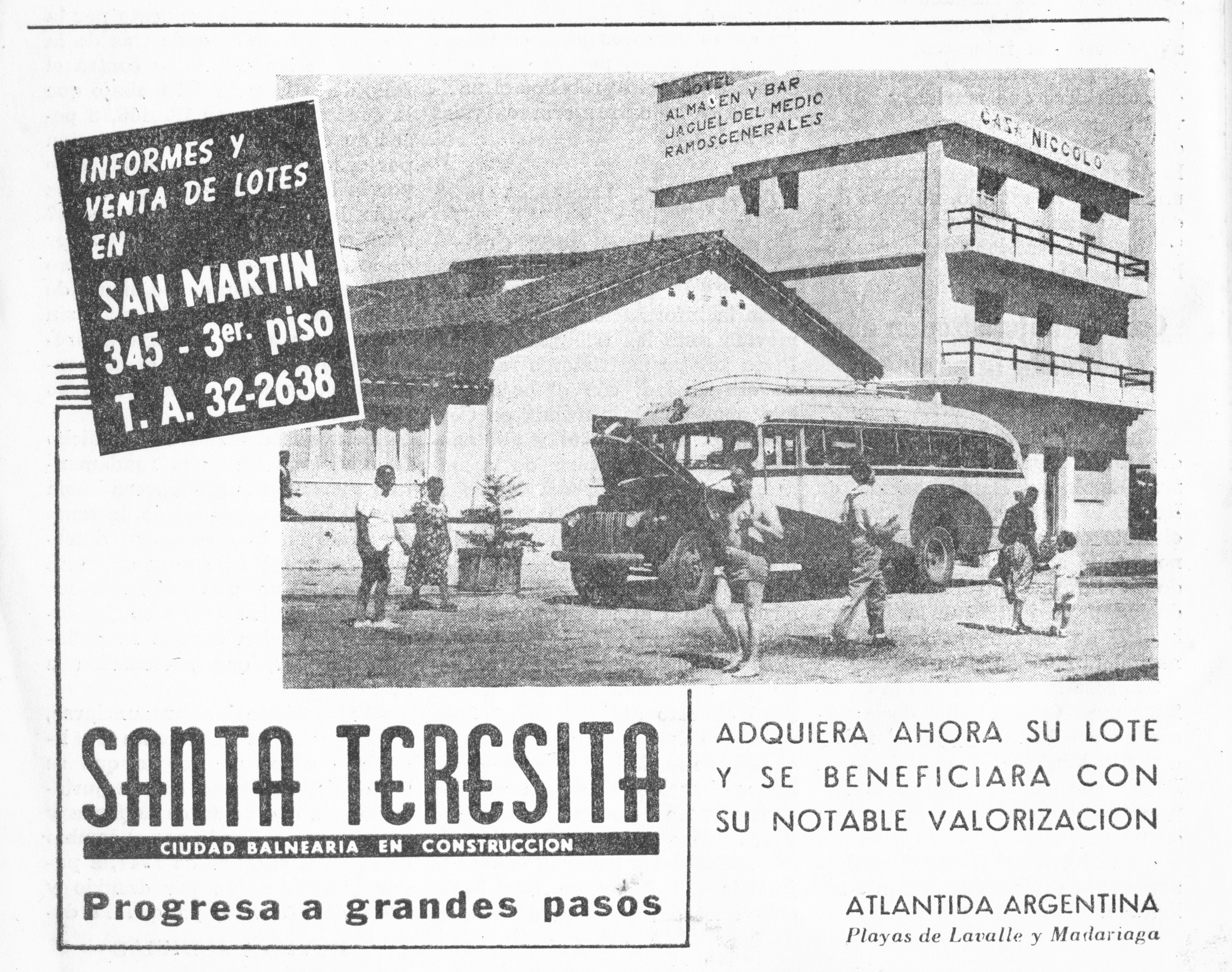 Publicidad sobre loteo de tierras en Santa Teresita, Buenos Aires.